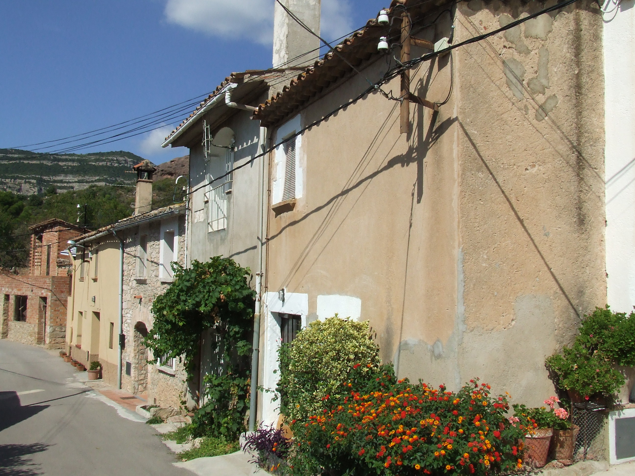 Cases de la Vall Blanca (Riells del Fai, Bigues i Riells, Vallès Oriental)